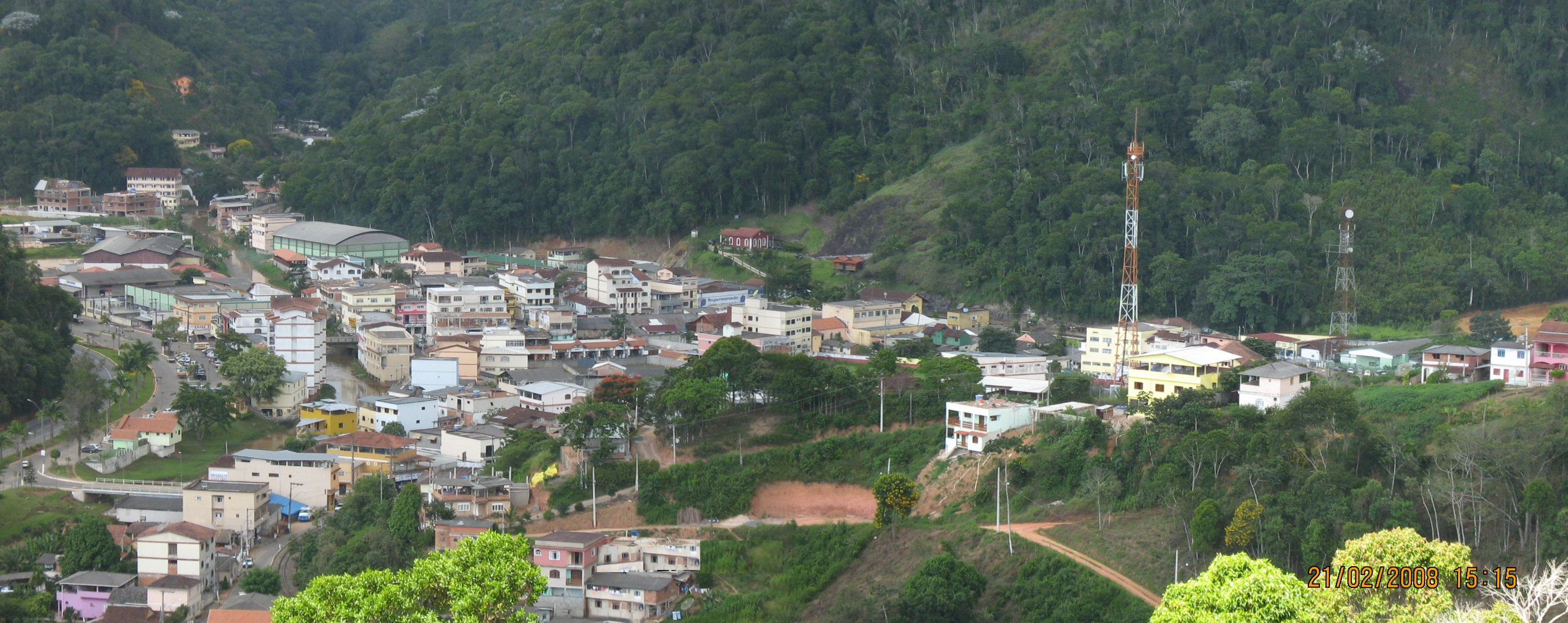 Panorâmica da cidade de Marechal Floriano no região serrana do estado do Espírito Santo, Brasil